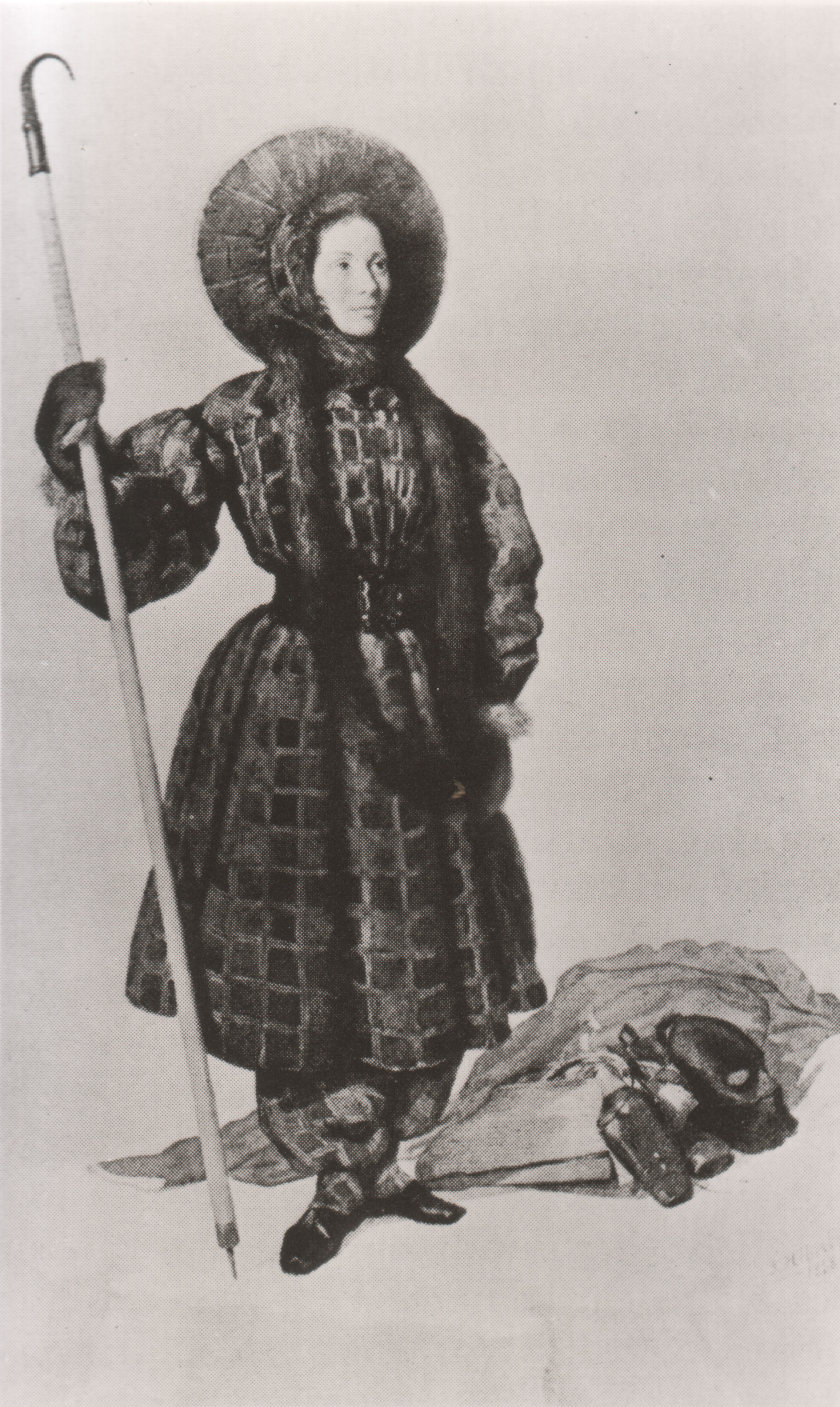 Henriette d’Angeville (1794–1871), Bezwingerin des Montblanc, in der von ihr selbst entworfenen Bergkleidung. Aquarell aus dem Jahr 1838 von J. Hébert.